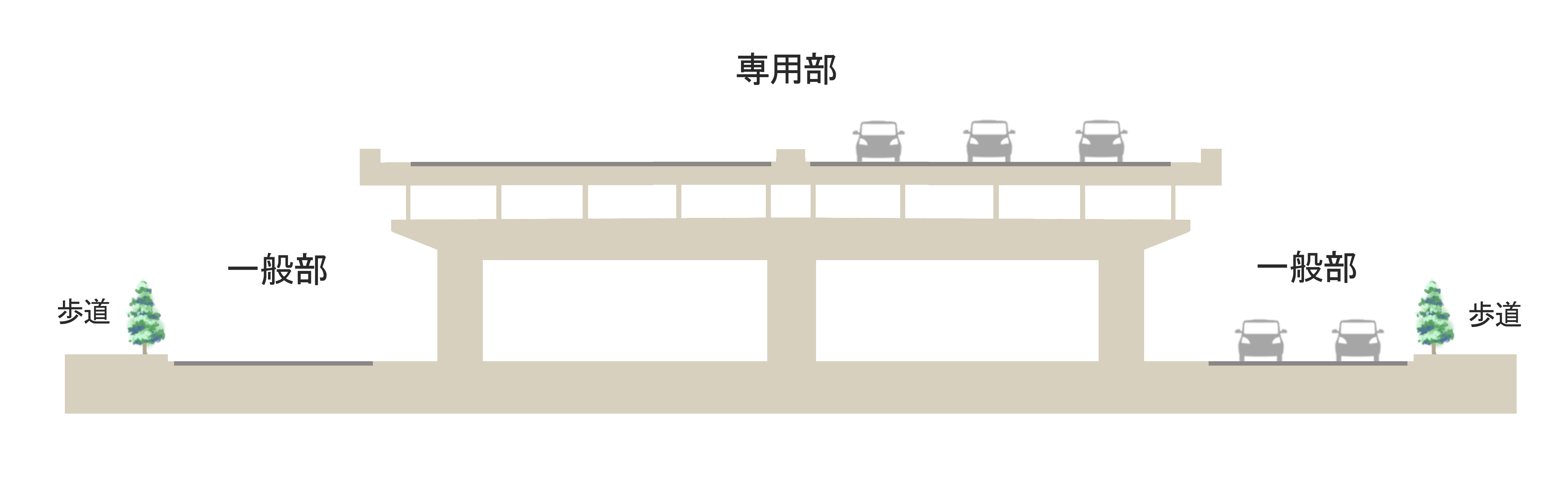 1967年頃の名古屋環状2号線標準断面図（50 mバージョン）